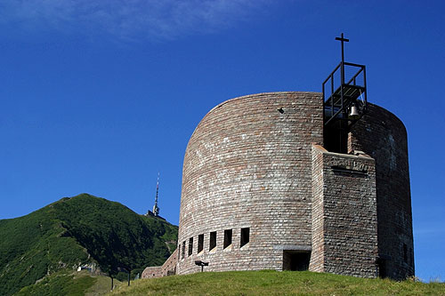 Santa Maria degli Angeli (Architekt: Mario Botta) auf Alpe Foppa